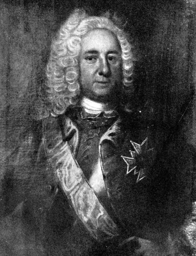 Jean von Utfall (1681–1749).